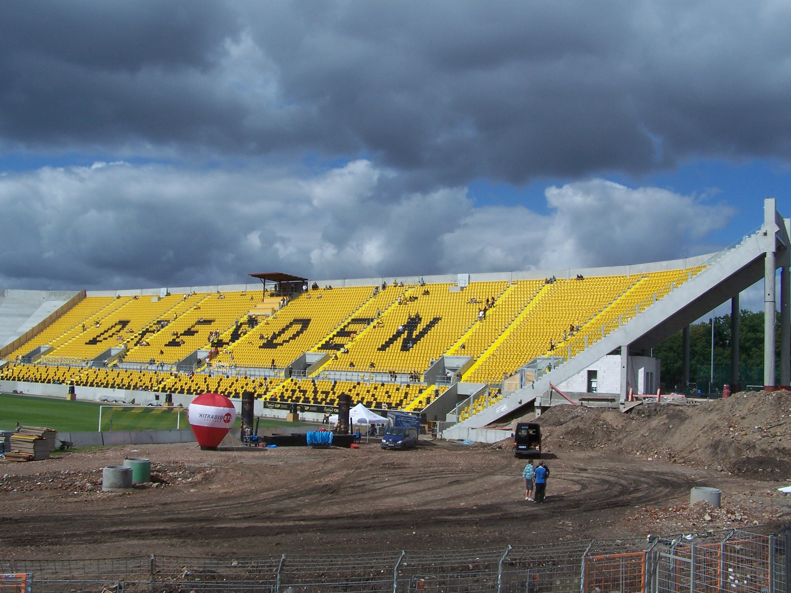 Einweihungstag der frisch fertiggestellten Westtribüne im Rudolf-Harbig-Stadion Dresden